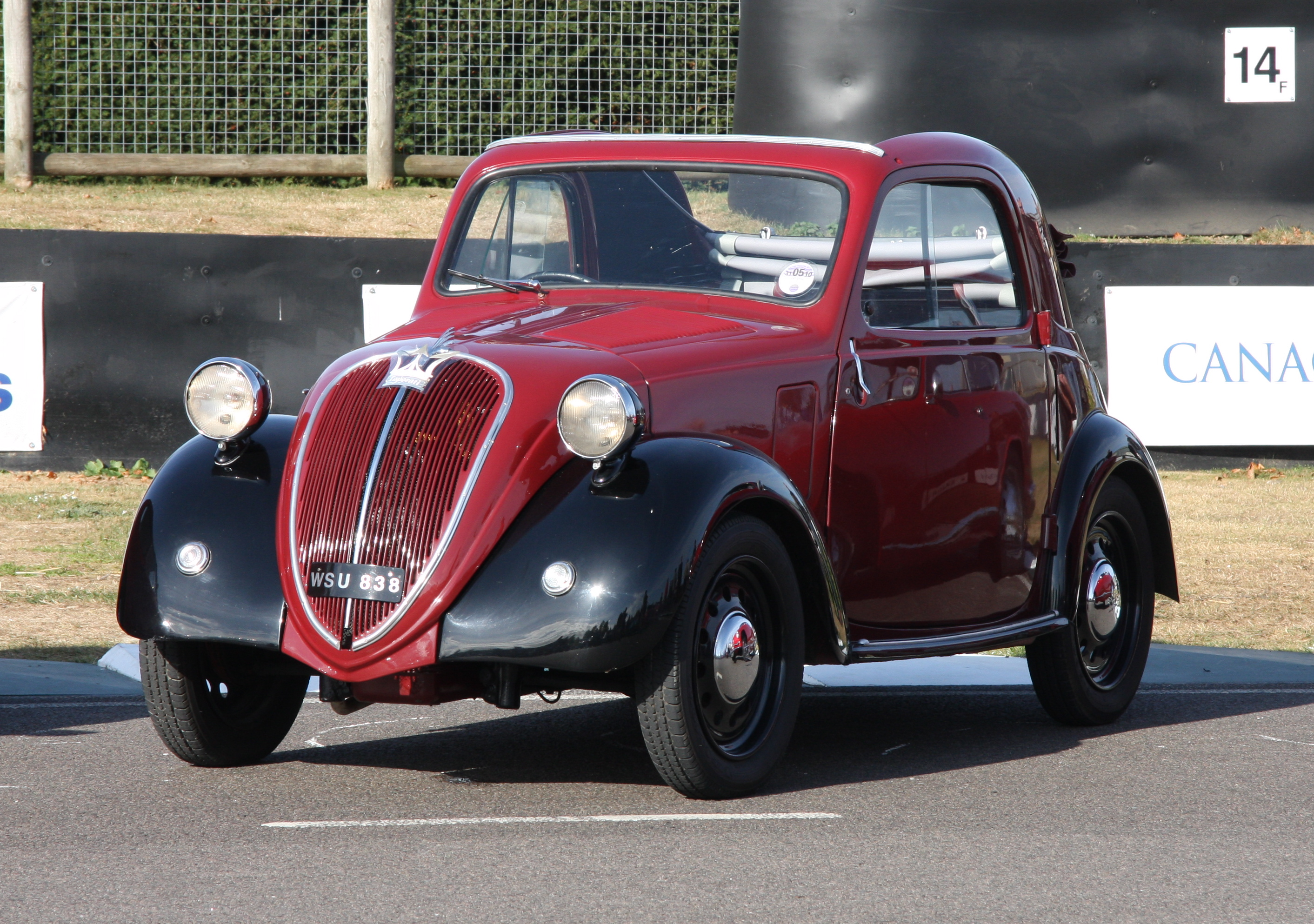 1937 Fiat 500 Topolino